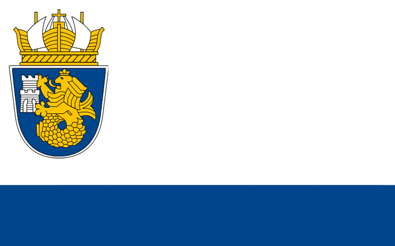 Знаме на гр. Бургас